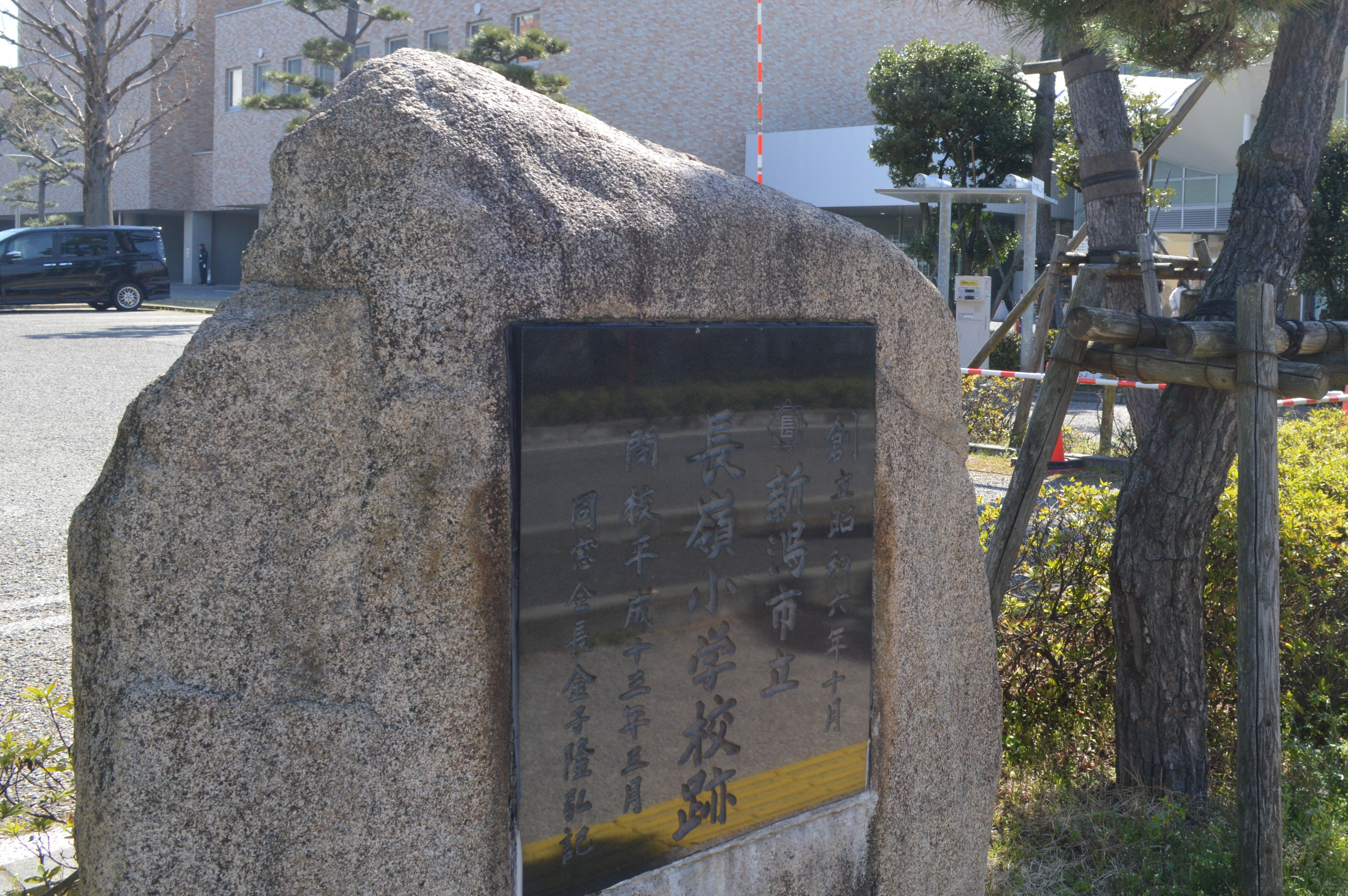 新潟県新潟市中央区にある新潟市立中央図書館「ほんぽーと」にある「長嶺小学校跡」。